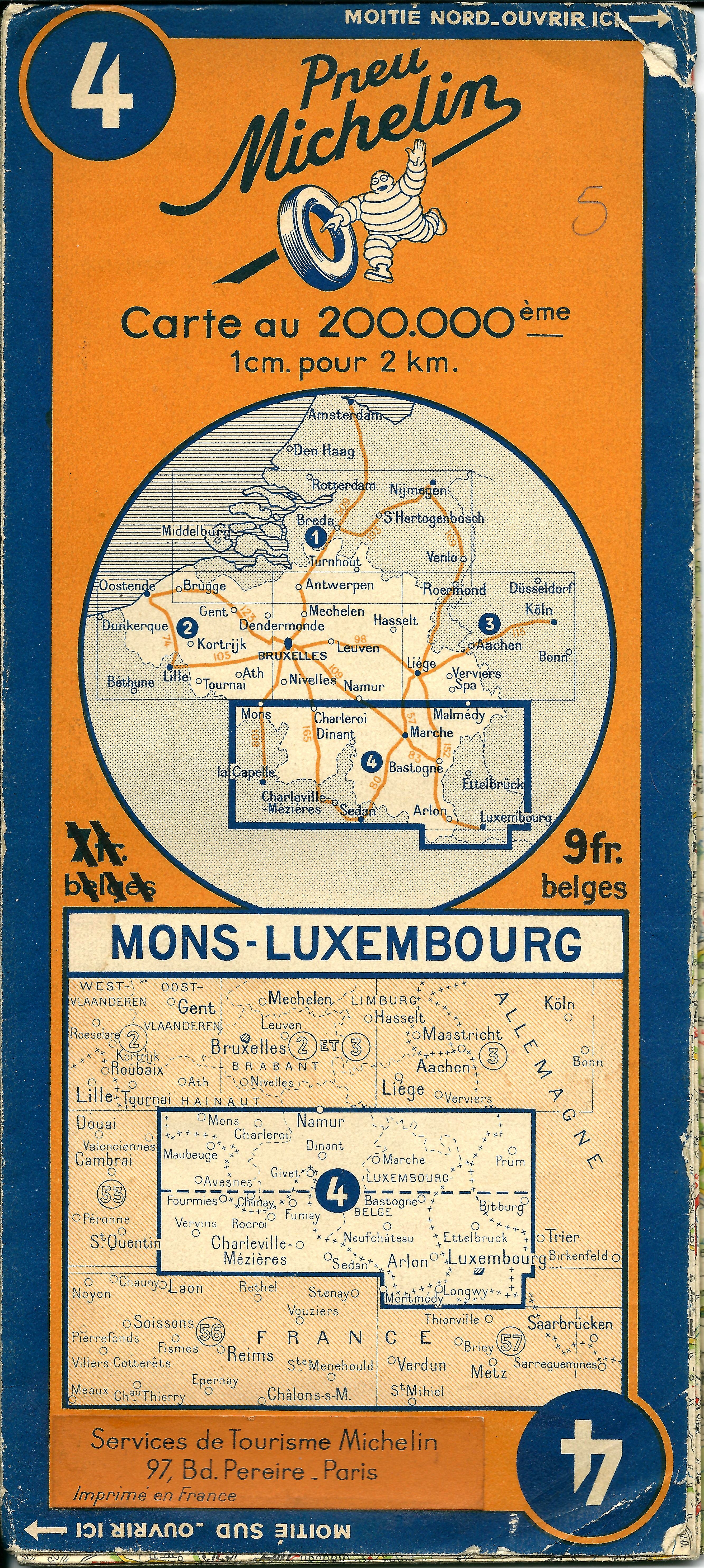 Michelin kaart nr 4 (Zuid België) uitgegeven in 1940. Dit moet voor de Duitse inval van 10 mei 1940 verkocht zijn.